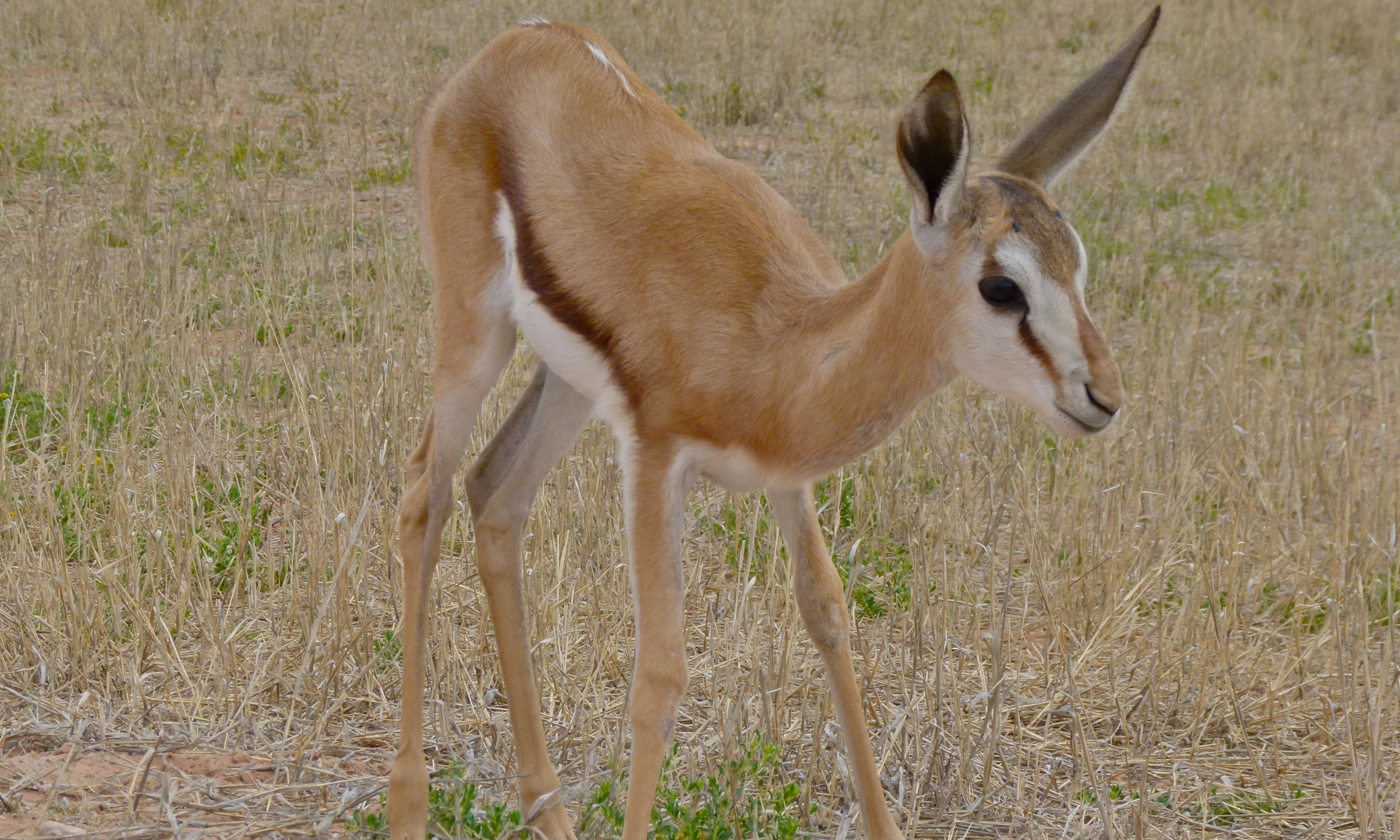 Auob Riverbed, Kgalagadi Transfrontier Park, SOUTH AFRICA